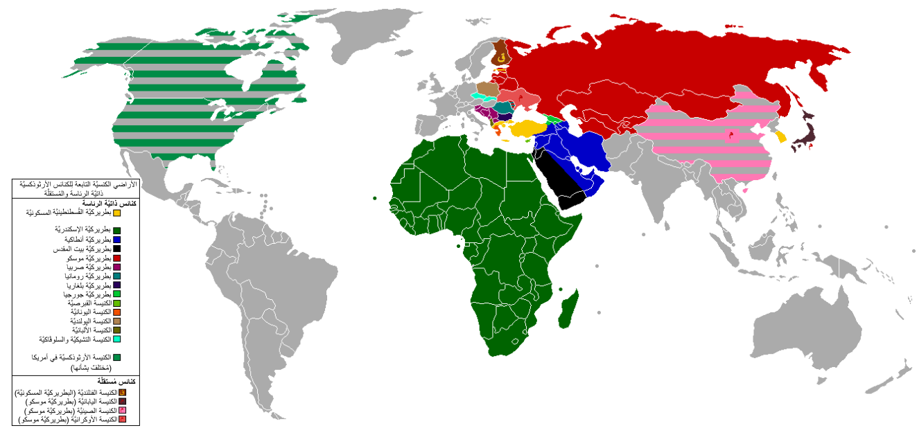 خارطة تُظهر توزُّع الكنائس الأرثوذكسيَّة في العالم. المناطق المُظللة هي المناطق التي هاجر إليها بعض الأرثوذكس من دُولٍ أُخرى أو اعتنق بعضُ أهلها المذهب الأرثوذكسي ونُسبوا إلى كنيسةٍ مُعينة، فيما يعتبرهم بعض الباحثين غير مُؤكدي الانتماء لِكنيسةٍ واحدةٍ فقط نظرًا لأنَّ الأرثوذكسيَّة لم يكن لها موطئ قدم في هذه البلاد مُنذ قديم الزمان.